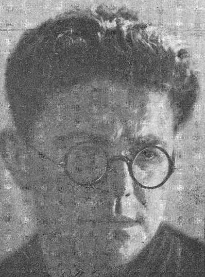 Manuel Abelenda Zapata, fotografía en Vida Gallega 1933